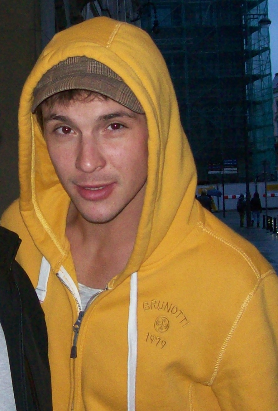 Polski aktor Mikołaj Roznerski 24 marca 2013.